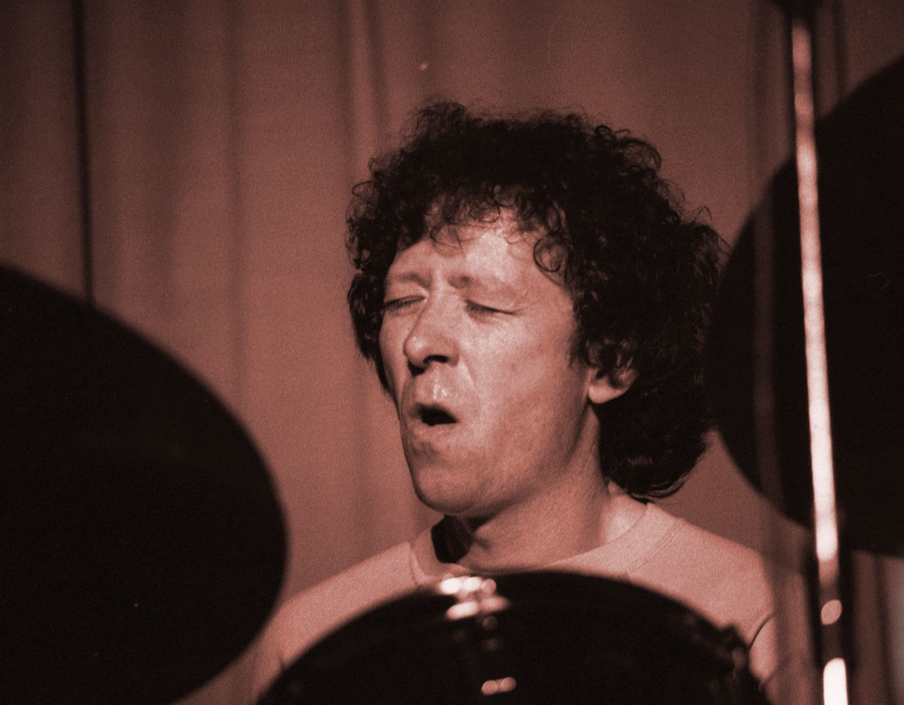 musicien, batteur